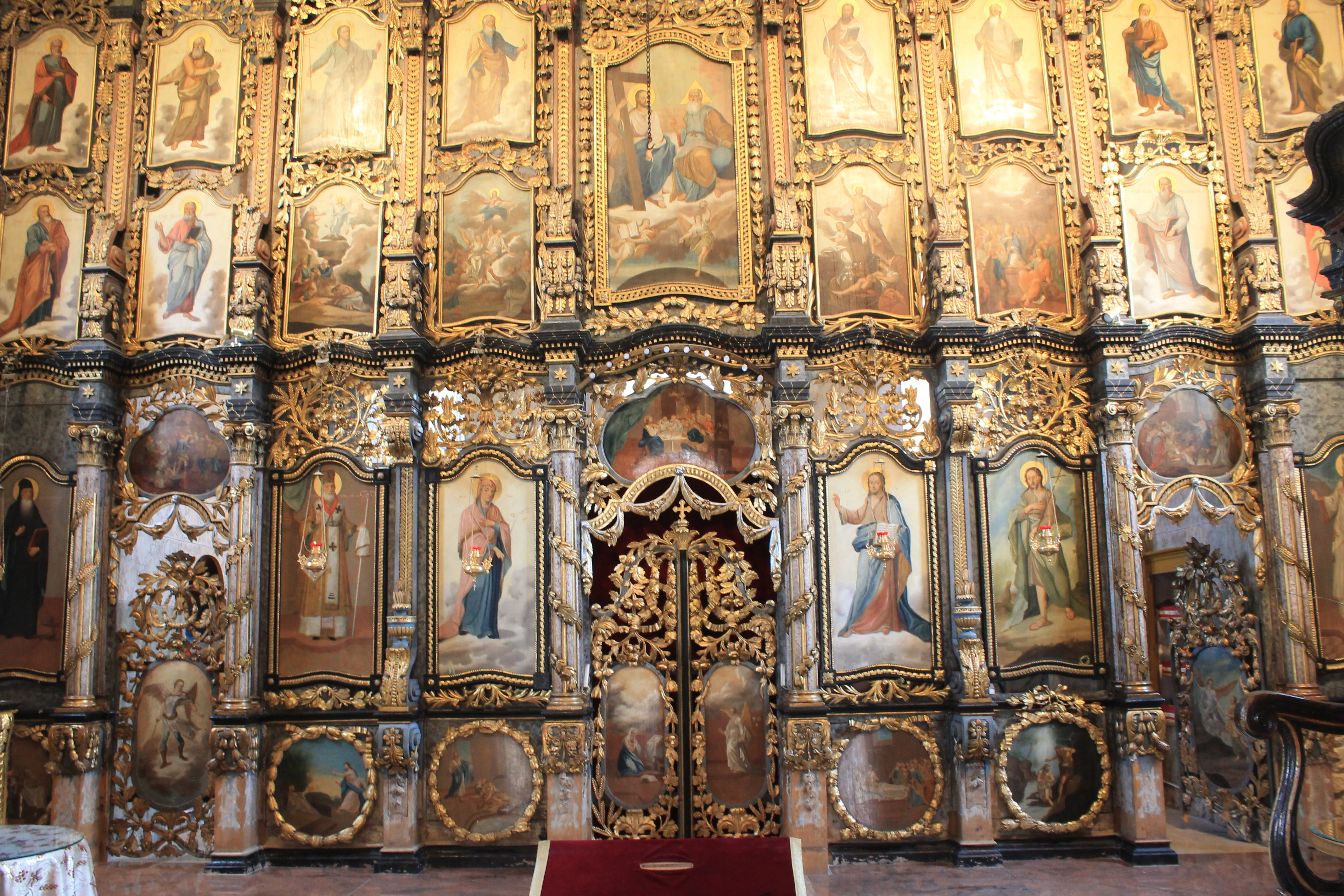 Crkva Rođenja Presvete Bogorodice (Sremska Kamenica), jul 2018.